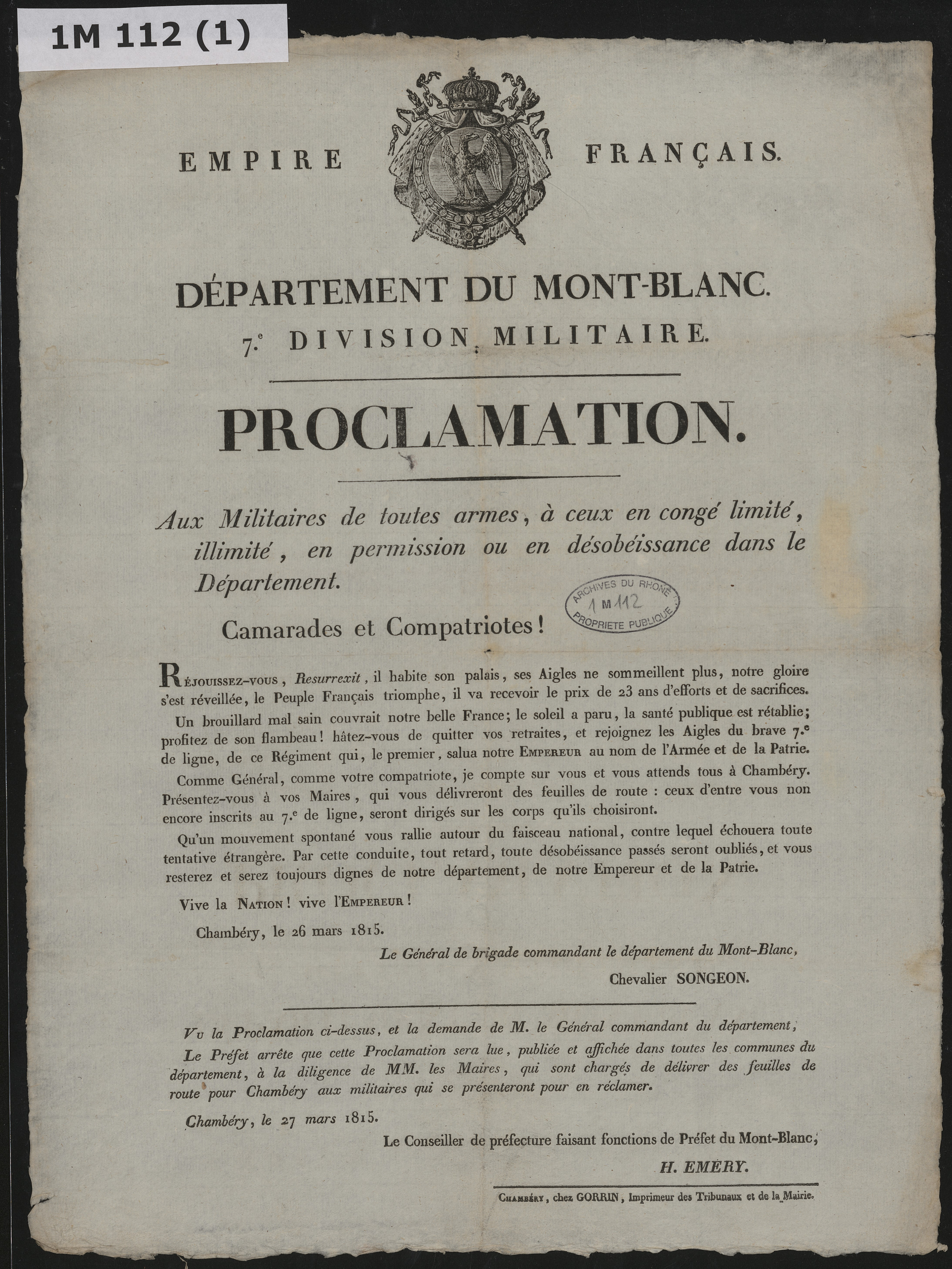 ADRML - 1 M 112